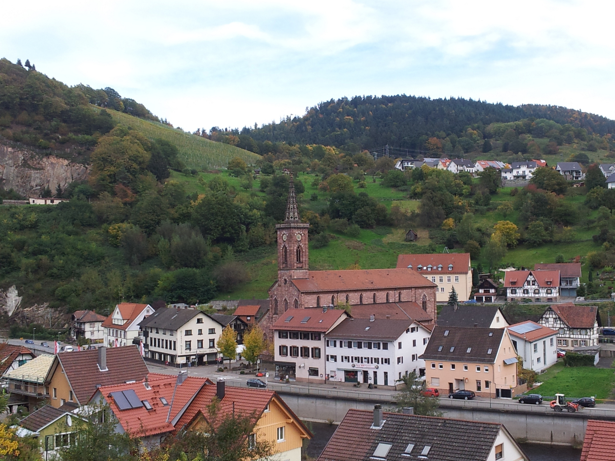 St. Wendelin Pfarrkirche Weisenbach